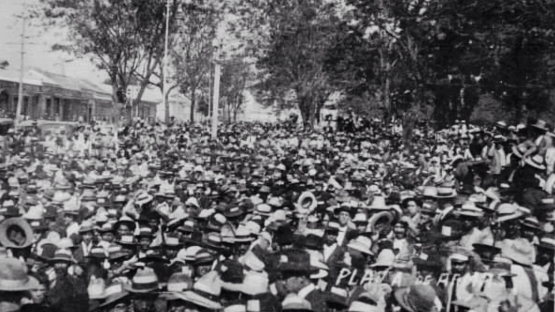 Semana trágica de Guatemala de 1920.